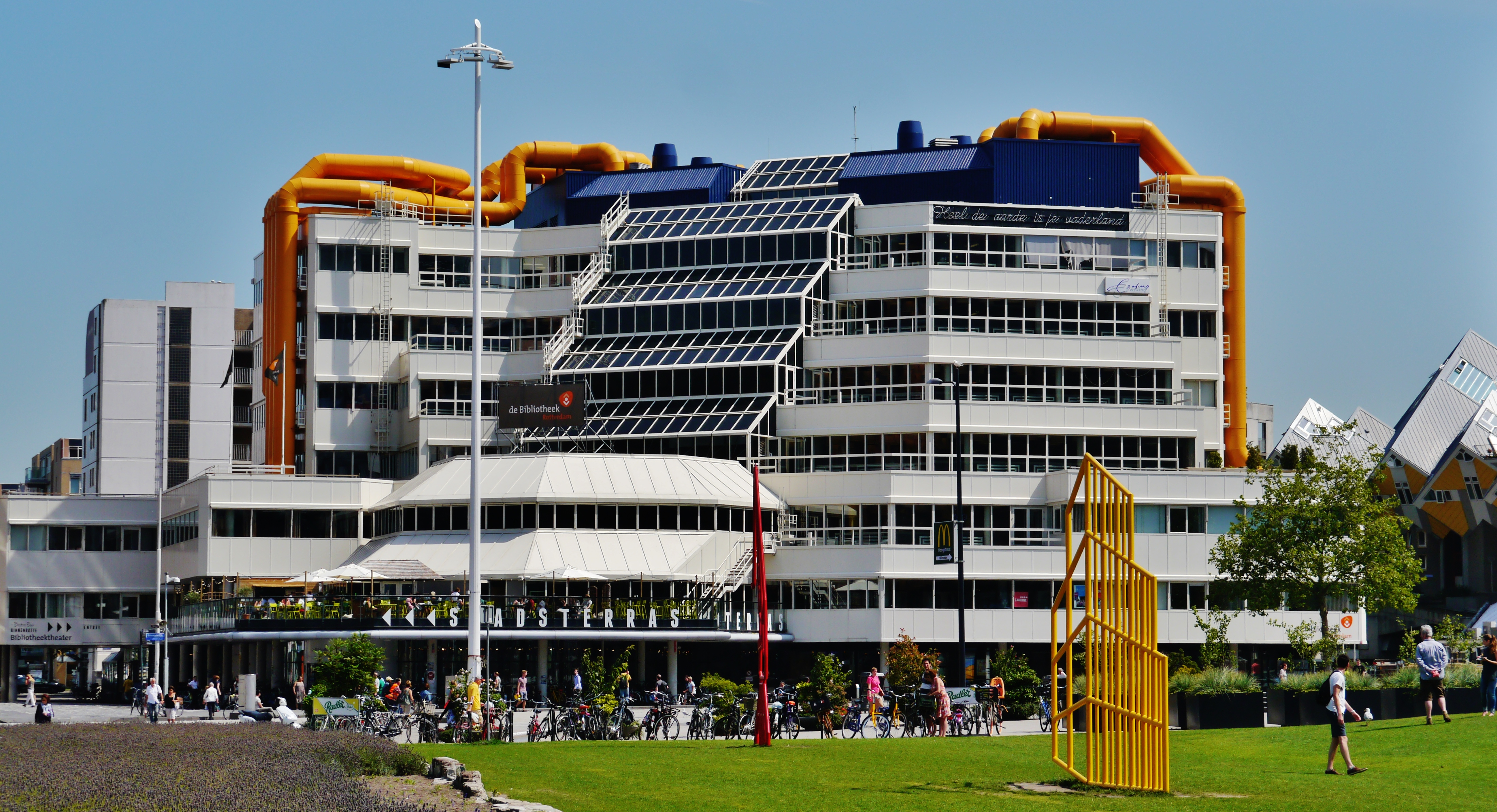 Stadtbibliothek, Rotterdam, Provinz Südholland, Niederlande